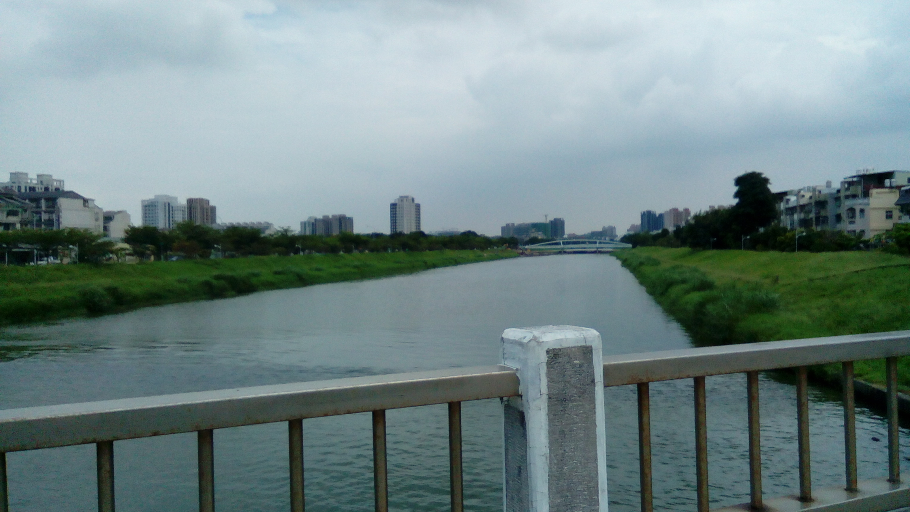 同上